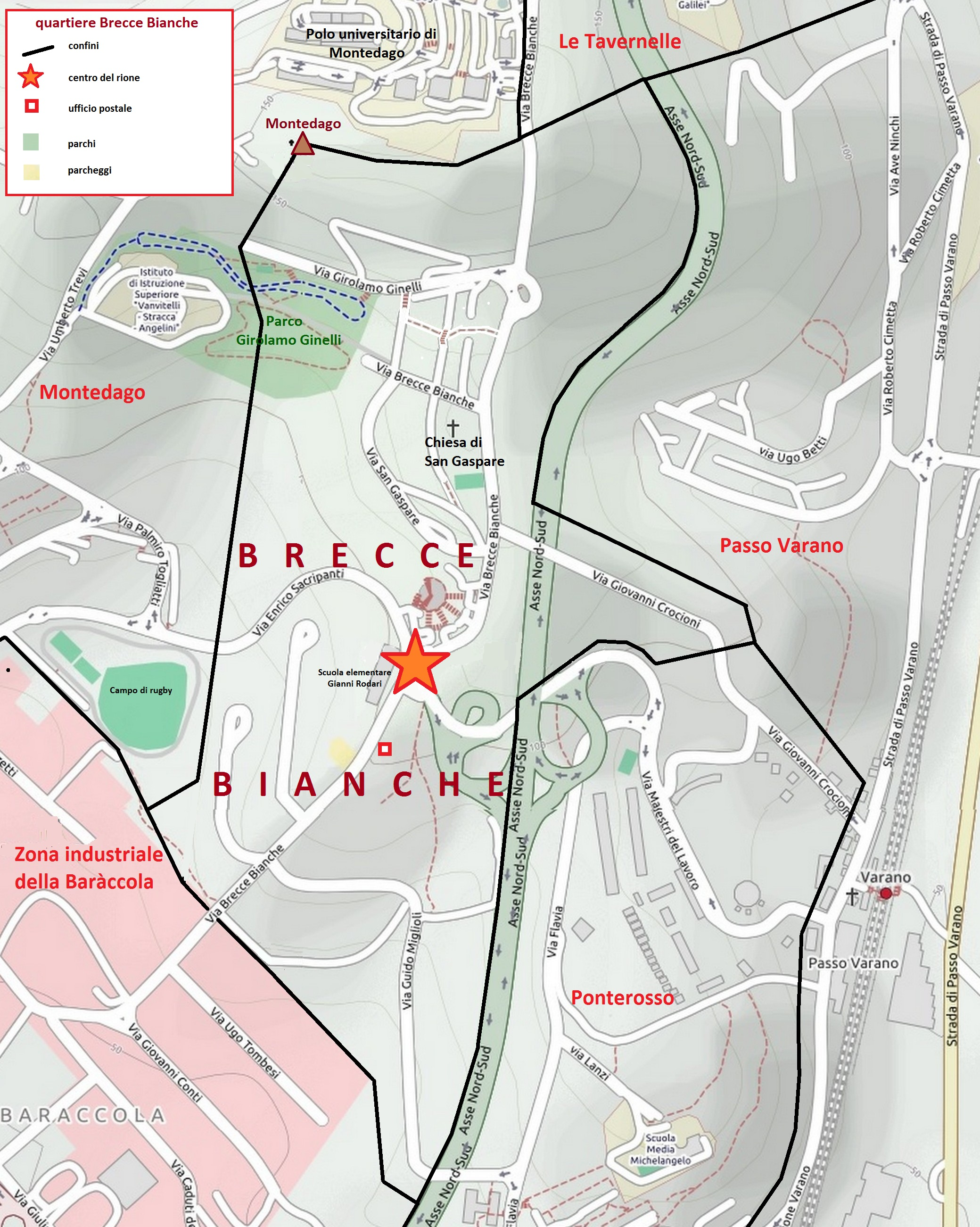 Mappa del quartiere Brecce Bianche (già denominato Q1 ed anche Università) di Ancona, con i confini, le vie, le piazze e i parchi.